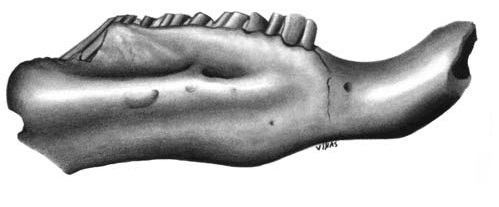 Mandible of Cardiatherium